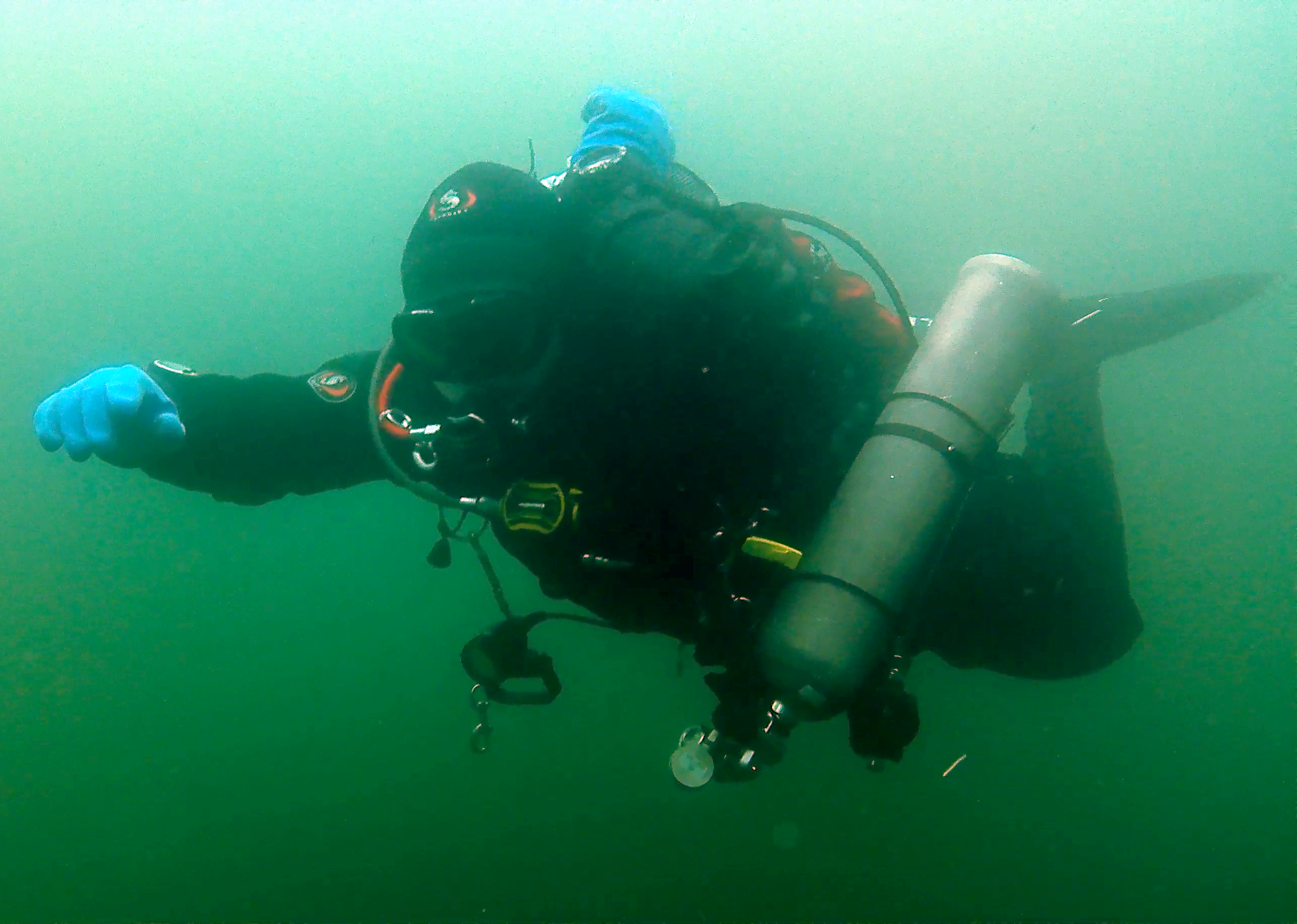 Ein Solotaucher mit einer Stage-Flasche dreht ein Ventil seiner Rückenflasche auf.